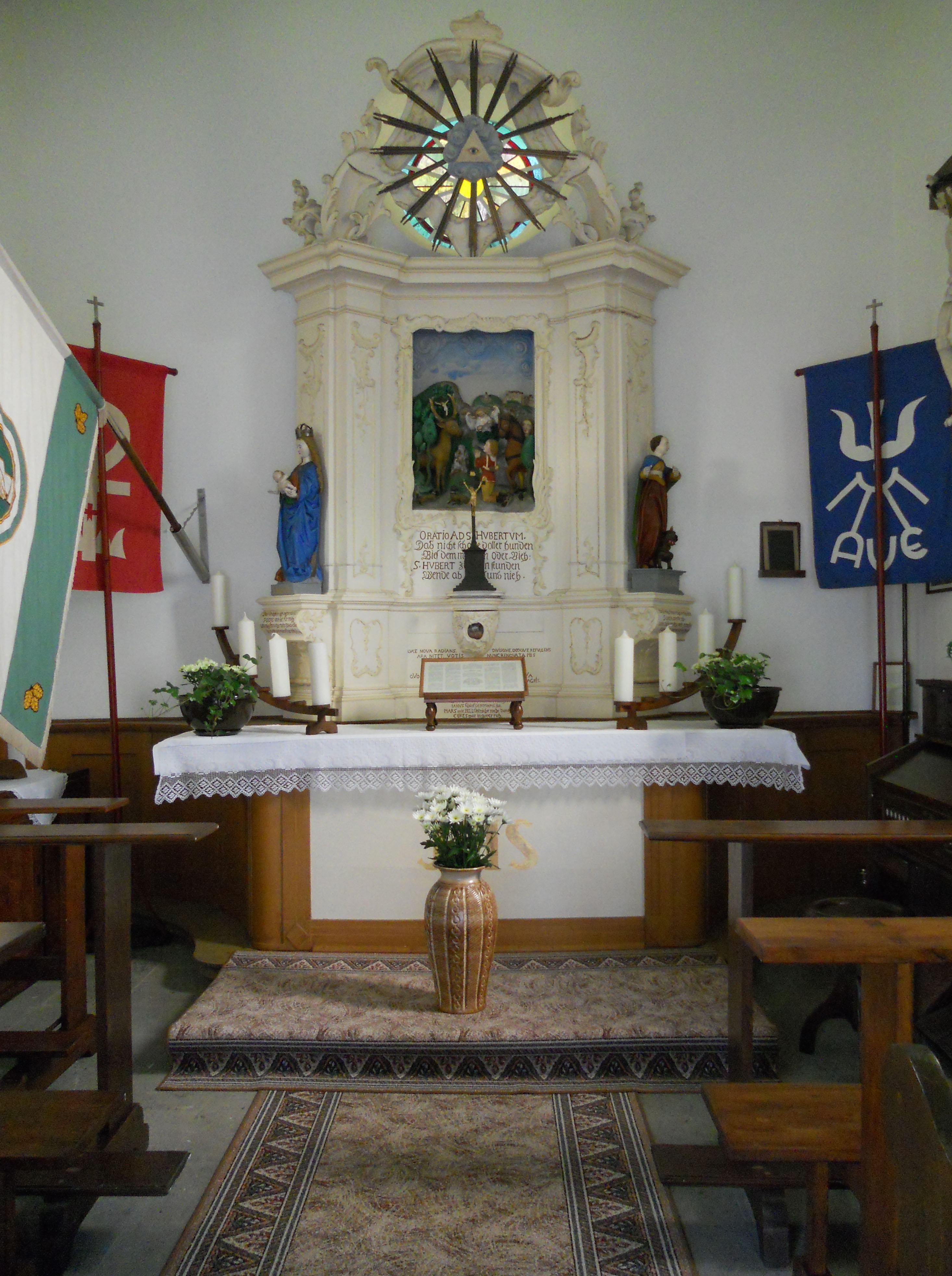 Georgskirche in Altenbrilon, Altar